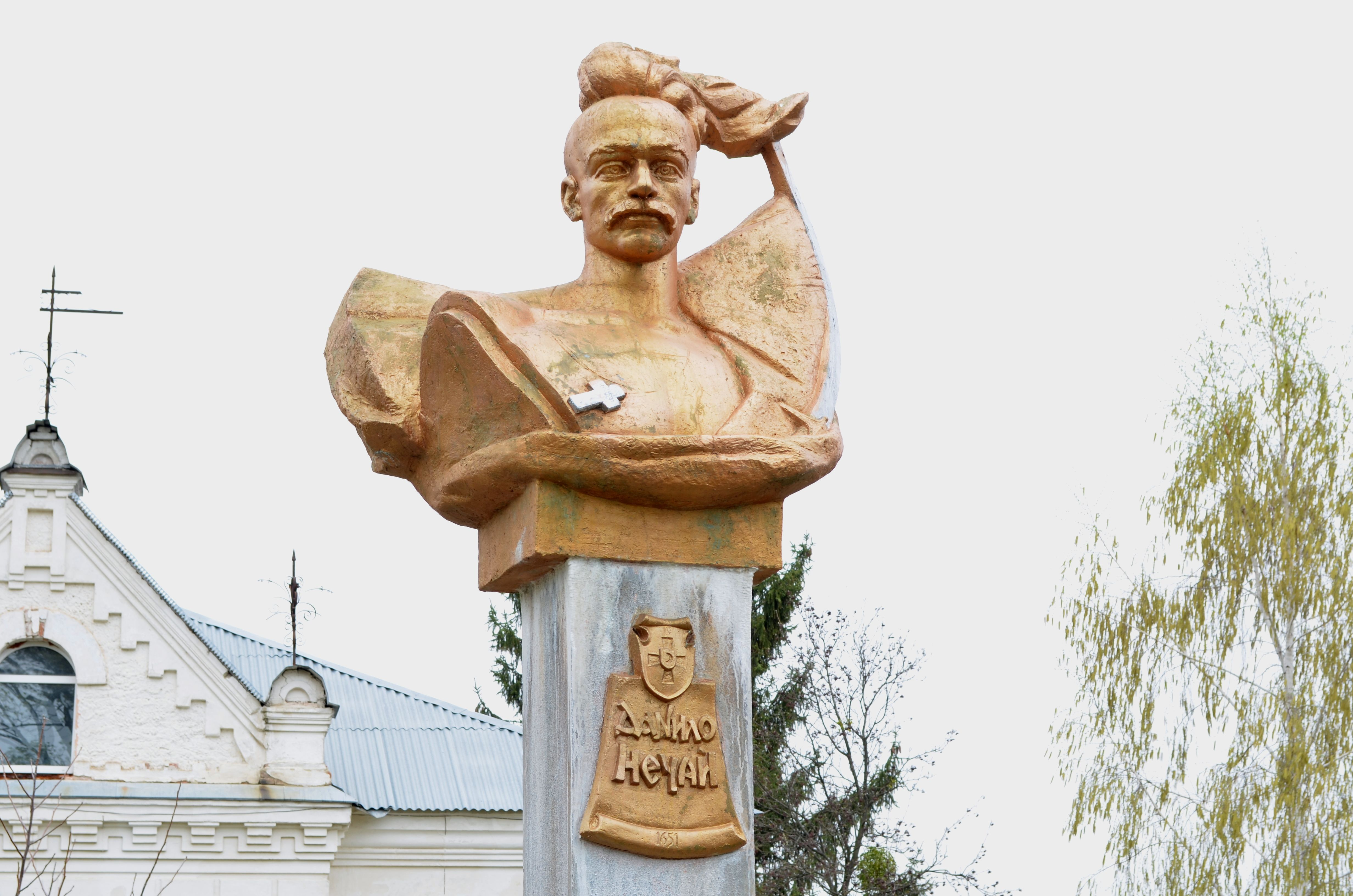 Пам'ятник Д. Нечаю, Брацлав, біля музичної школи